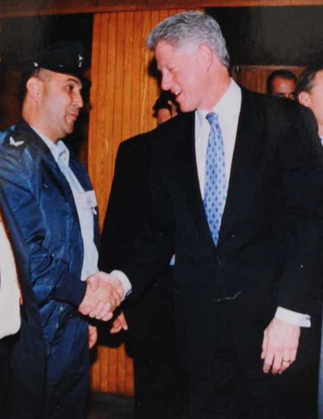 דובר משטרת ישראל תנ"צ אליהוא בן-און לוחץ את ידי נשיא ארצות הברית ביל קלינטון. ירושלים, דצמבר 1998.